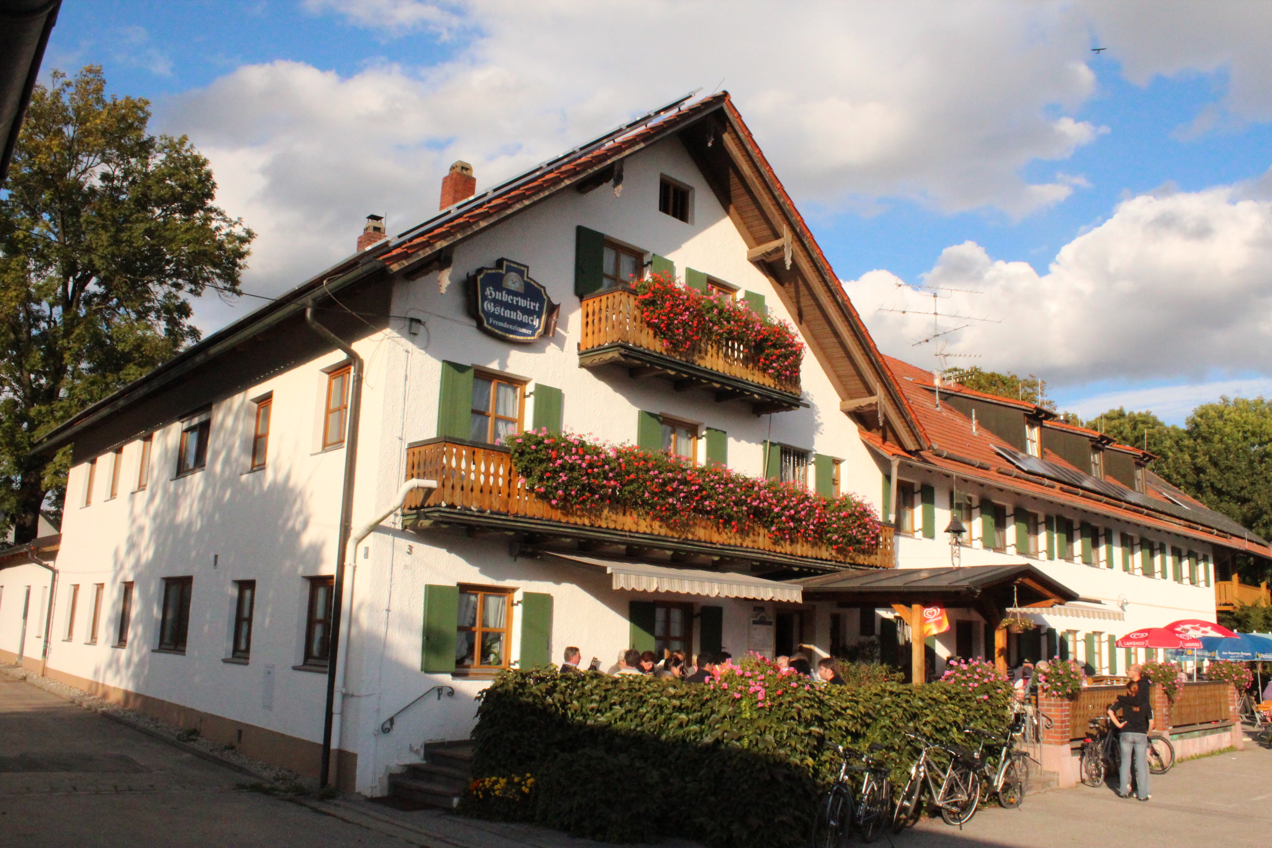 Huberwirt/Huberhof Gstaudach (Altdorf)